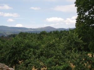 Vista Terra Chá desde Carballido, provincia de Lugo (España)